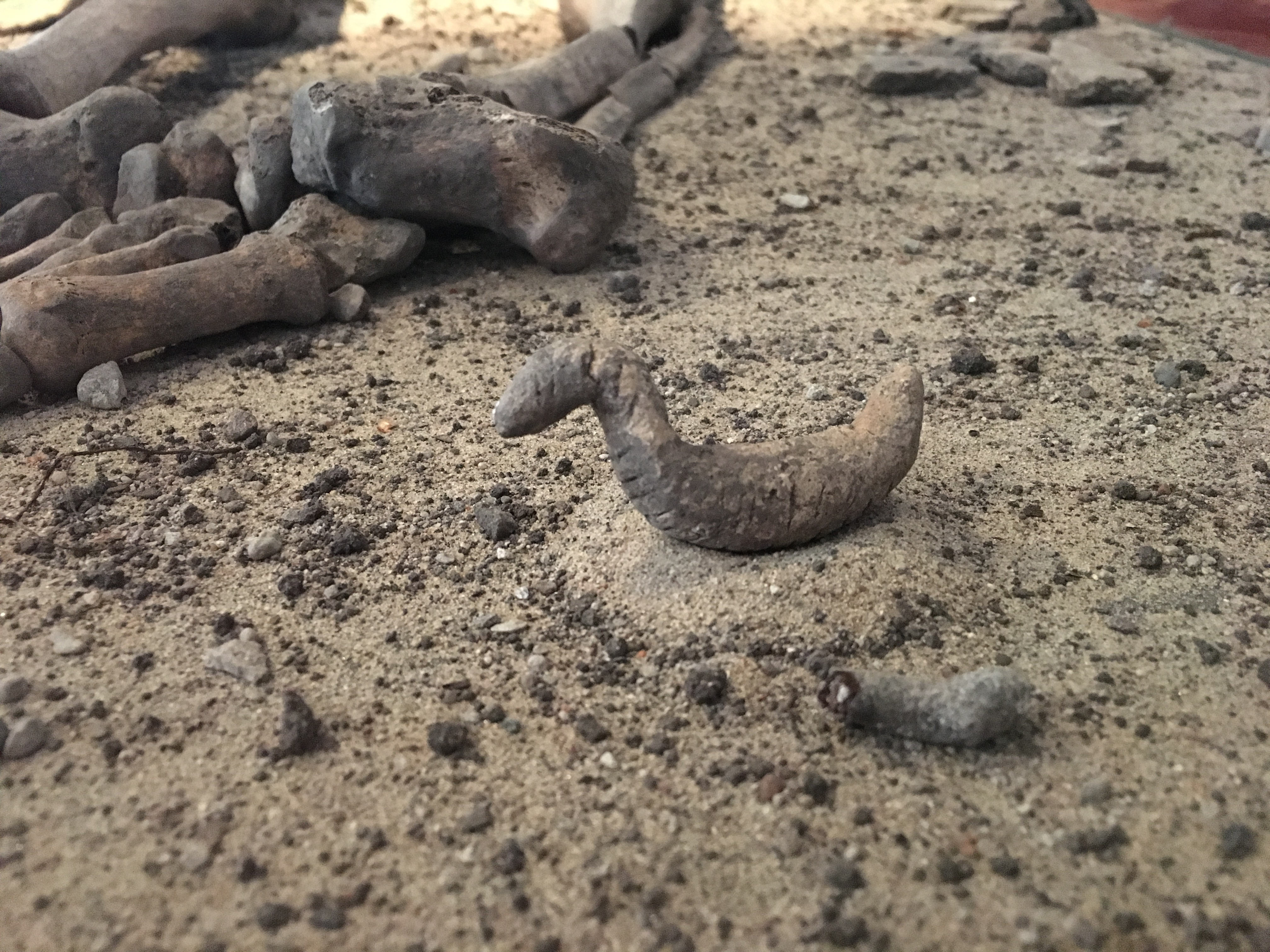 Figurin från Fornsalen på Gotlands museum. Se beskrivning